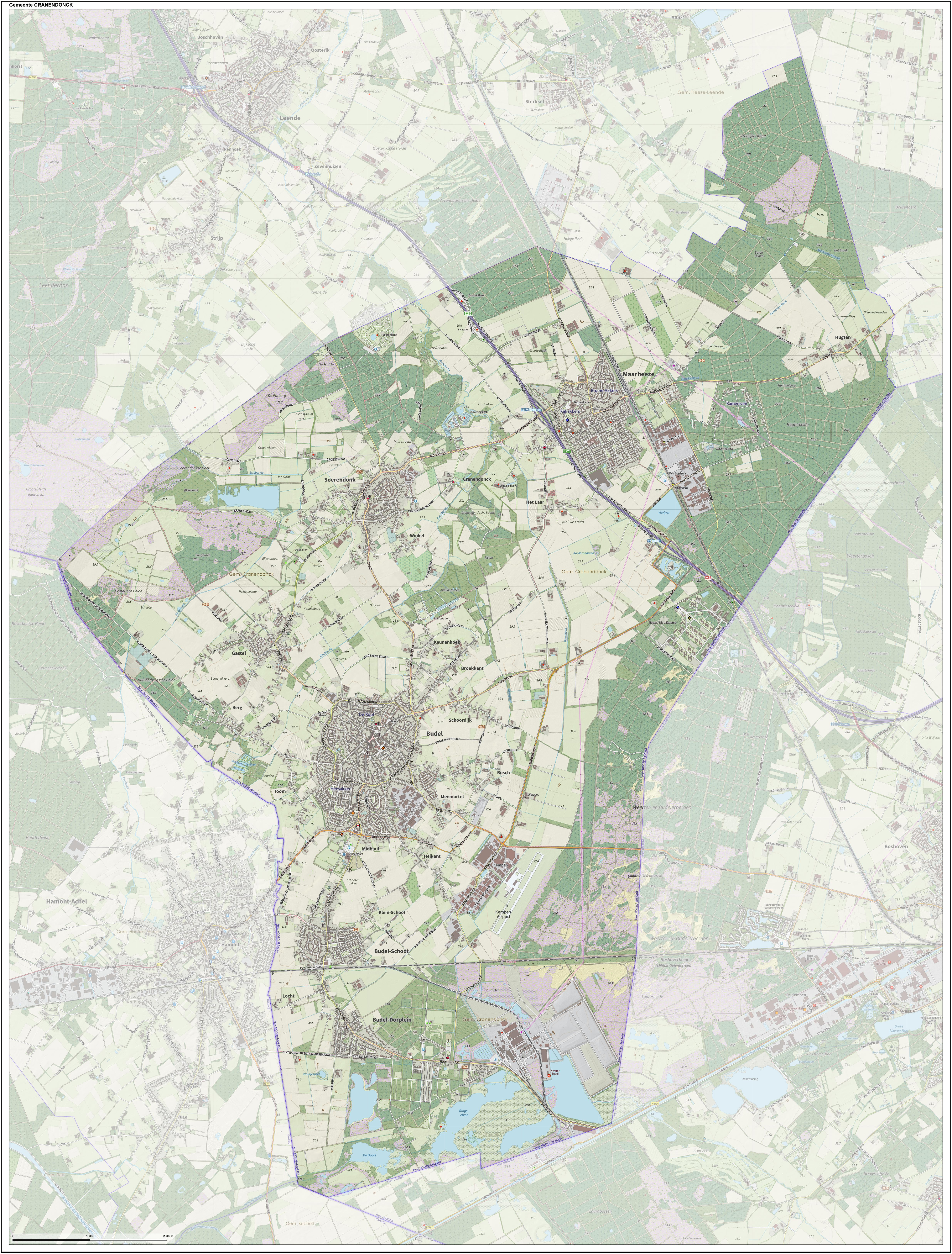 Topografische gemeentekaart. Resolutie: 400 pixels/km. Kaartbeeld samengesteld uit de open geodata van de Top10NL en Top25namen (Kadaster), Creative Commons-BY licentie. Gebouwvlakken uit open geodata BAG extract. Wegen uit de OpenStreetMap, OpenStreetMap community. Reliëfschaduw uit de Actuele Hoogtekaart AHN2. Samenstelling en kleurenschema: Jan-Willem van Aalst, met QGIS. Zie ook de Legenda.